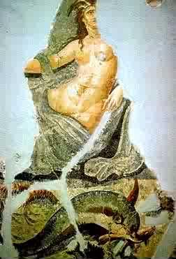 Zbytky mozaiky z Antiochie.